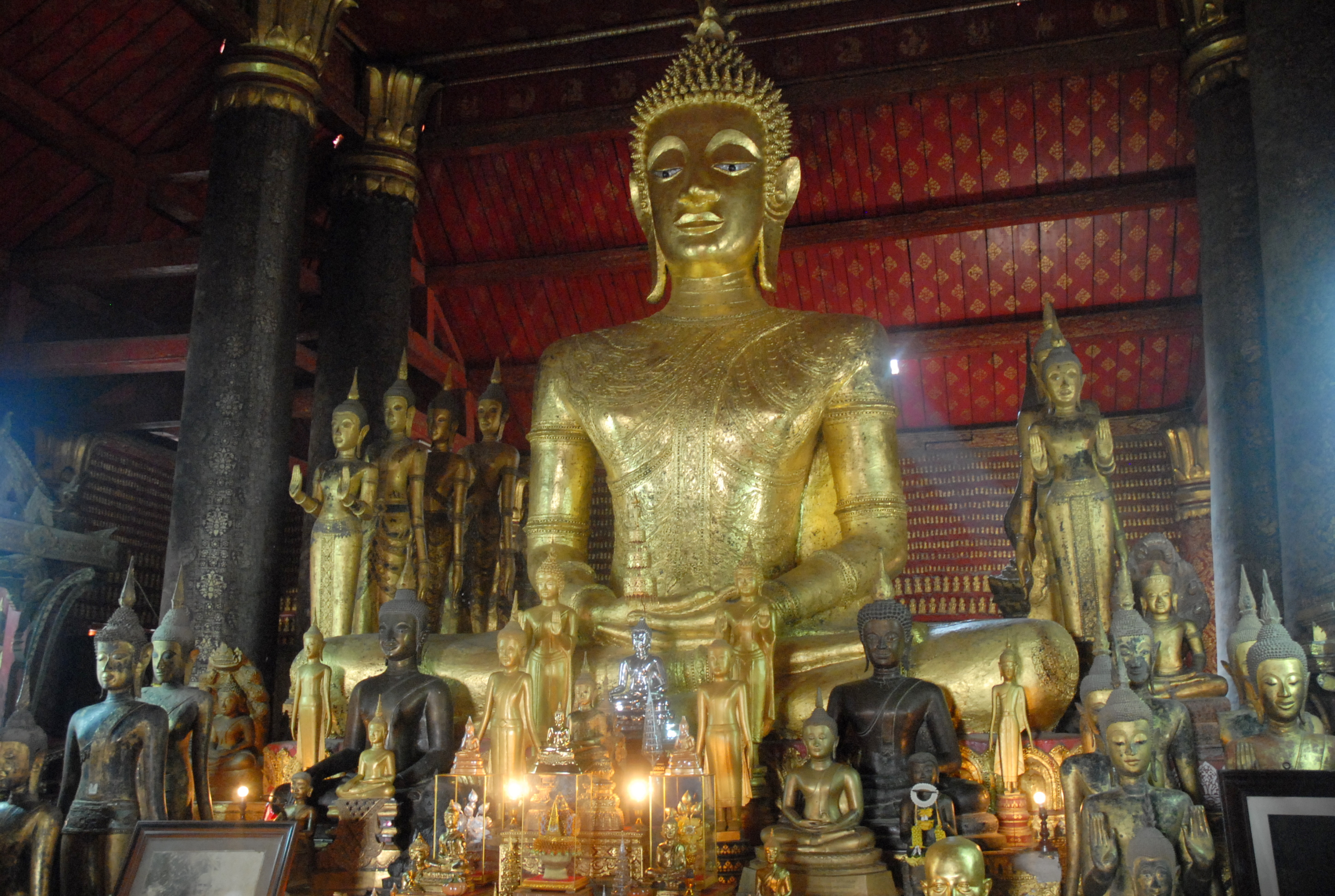 Bouddhas dans la pagode Vat May à Luang Prabang